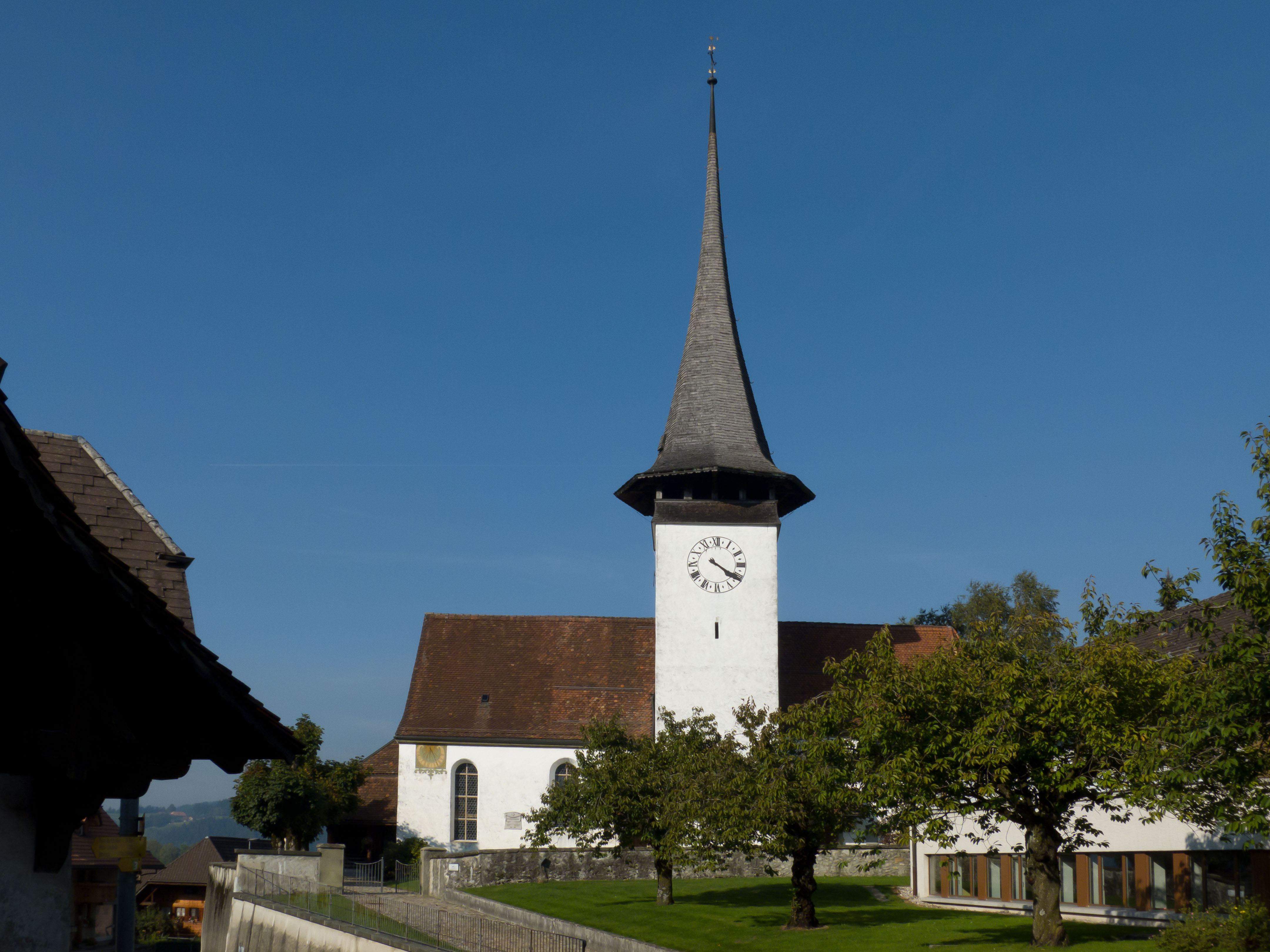 Lauperswil, Kirche 1618